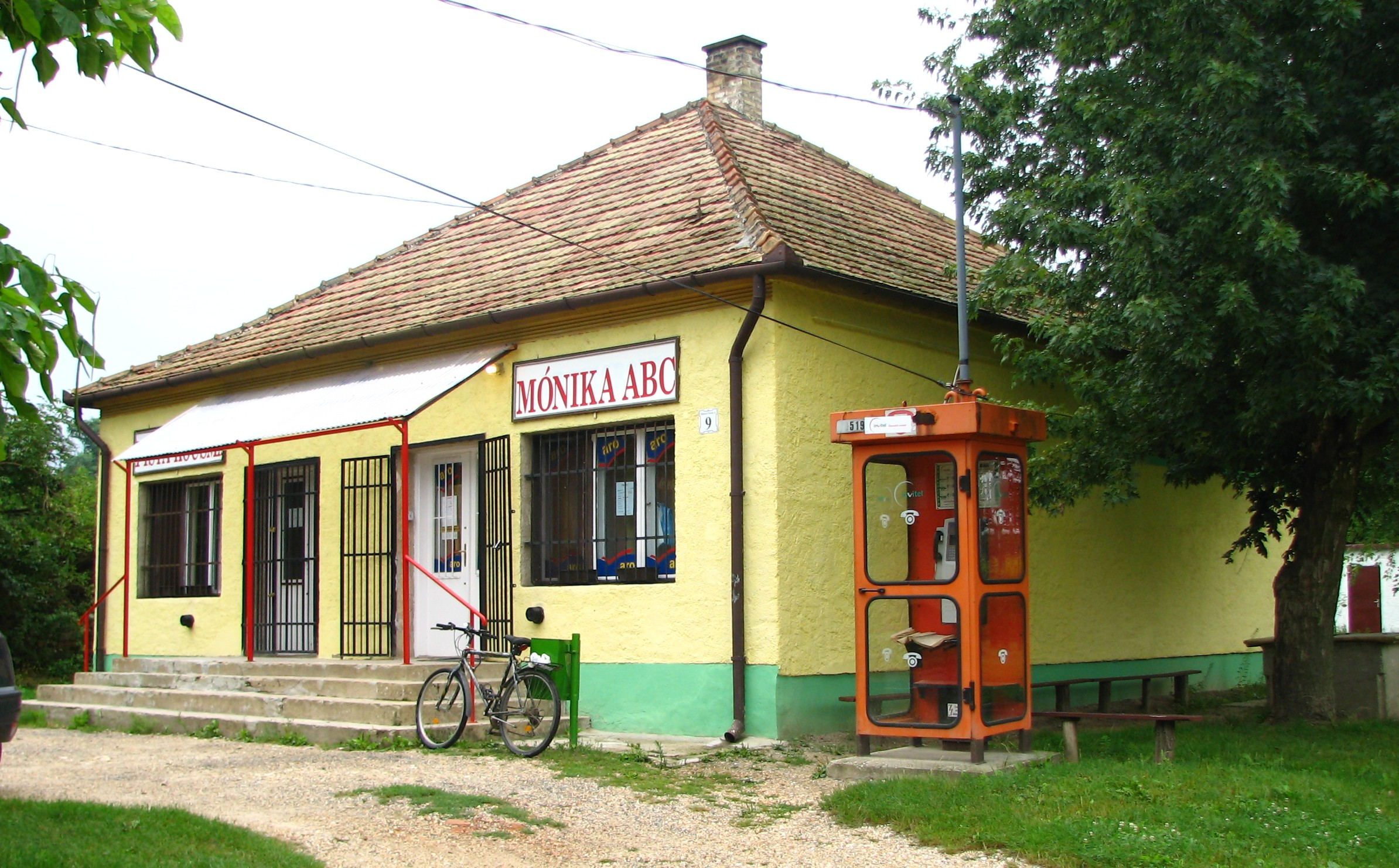 Italbolt és élelmiszerbolt (Kisszőlős, Veszprém megye)